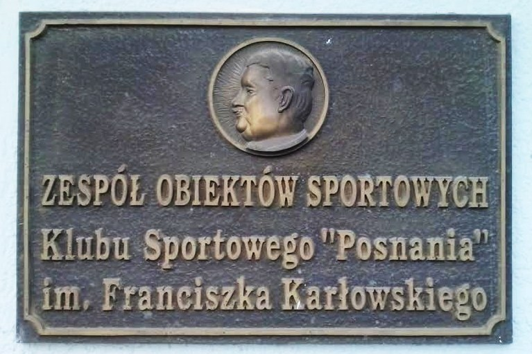 Pływalnia Posnania w Poznaniu - ul. Winogrady. Tablica pamiątkowa.